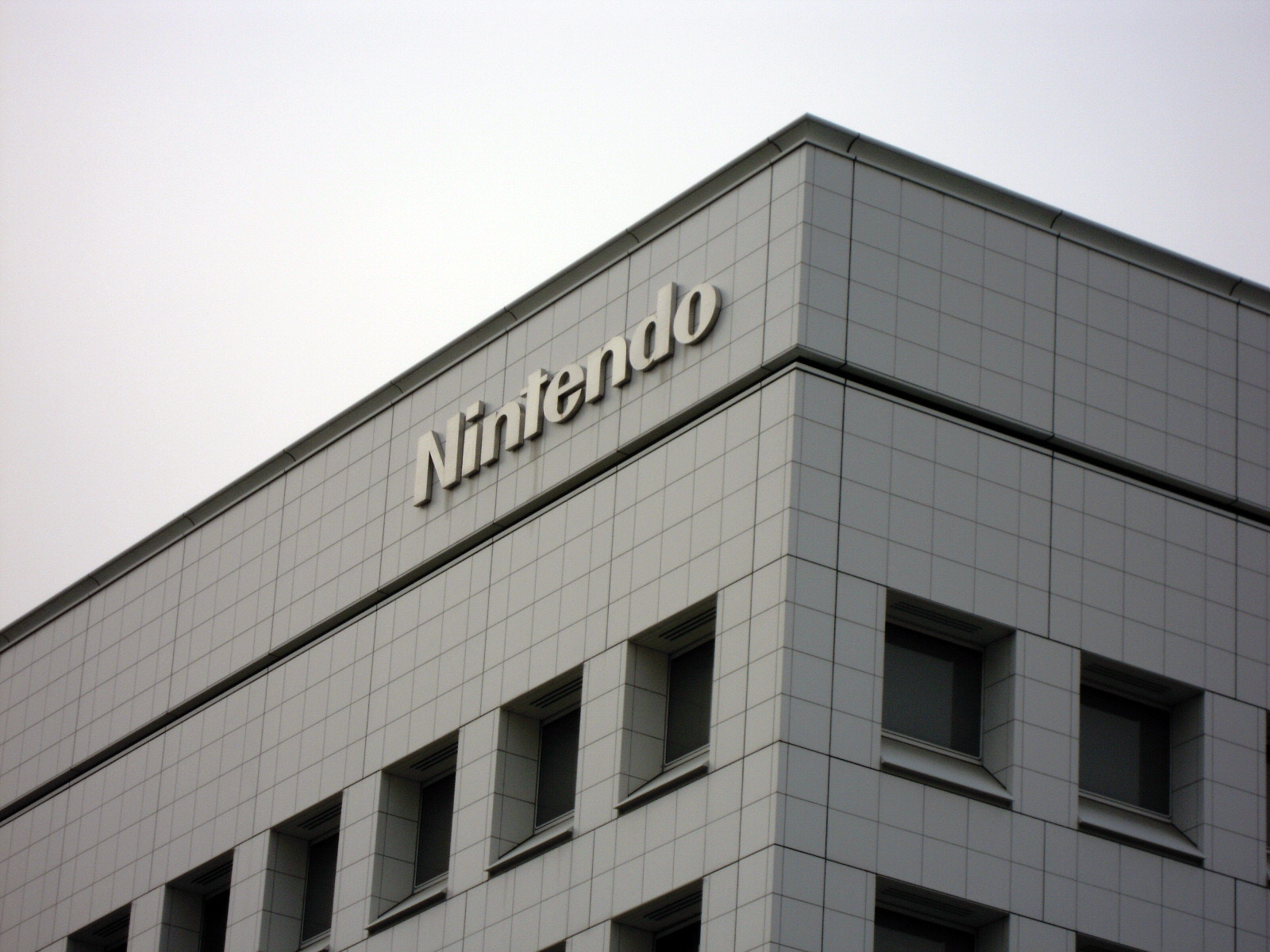 Nintendo